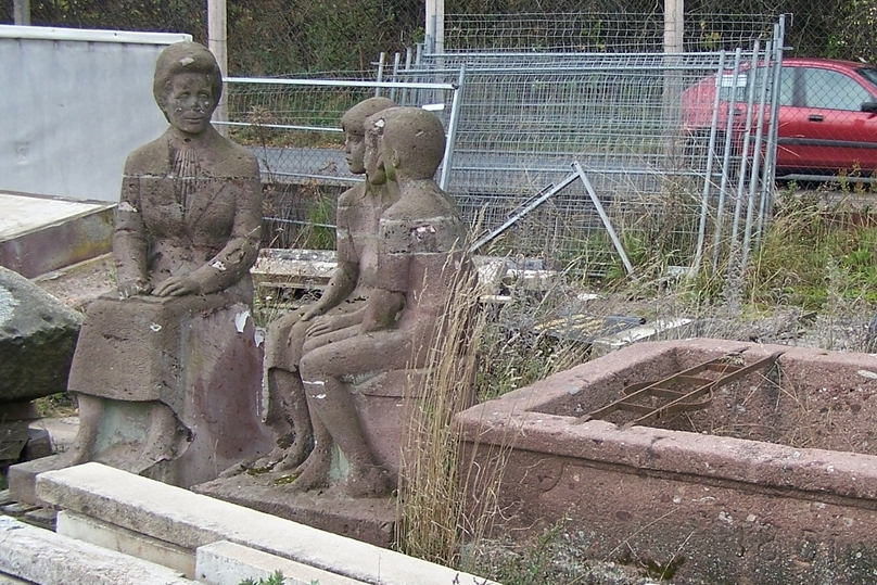 Das Käte-Duncker-Denkmal im Depot einer Steinmetzwerkstatt (2013)